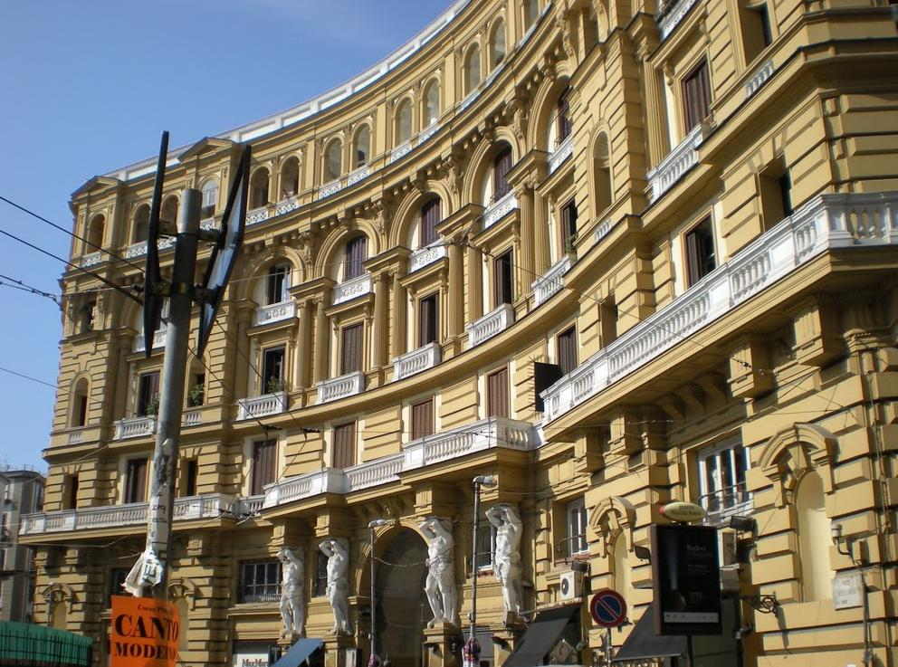 Piazza Nicola Amore (o Piazza 4 Palazzi) di Napoli. Uno dei 4 Palazzi monumentali.